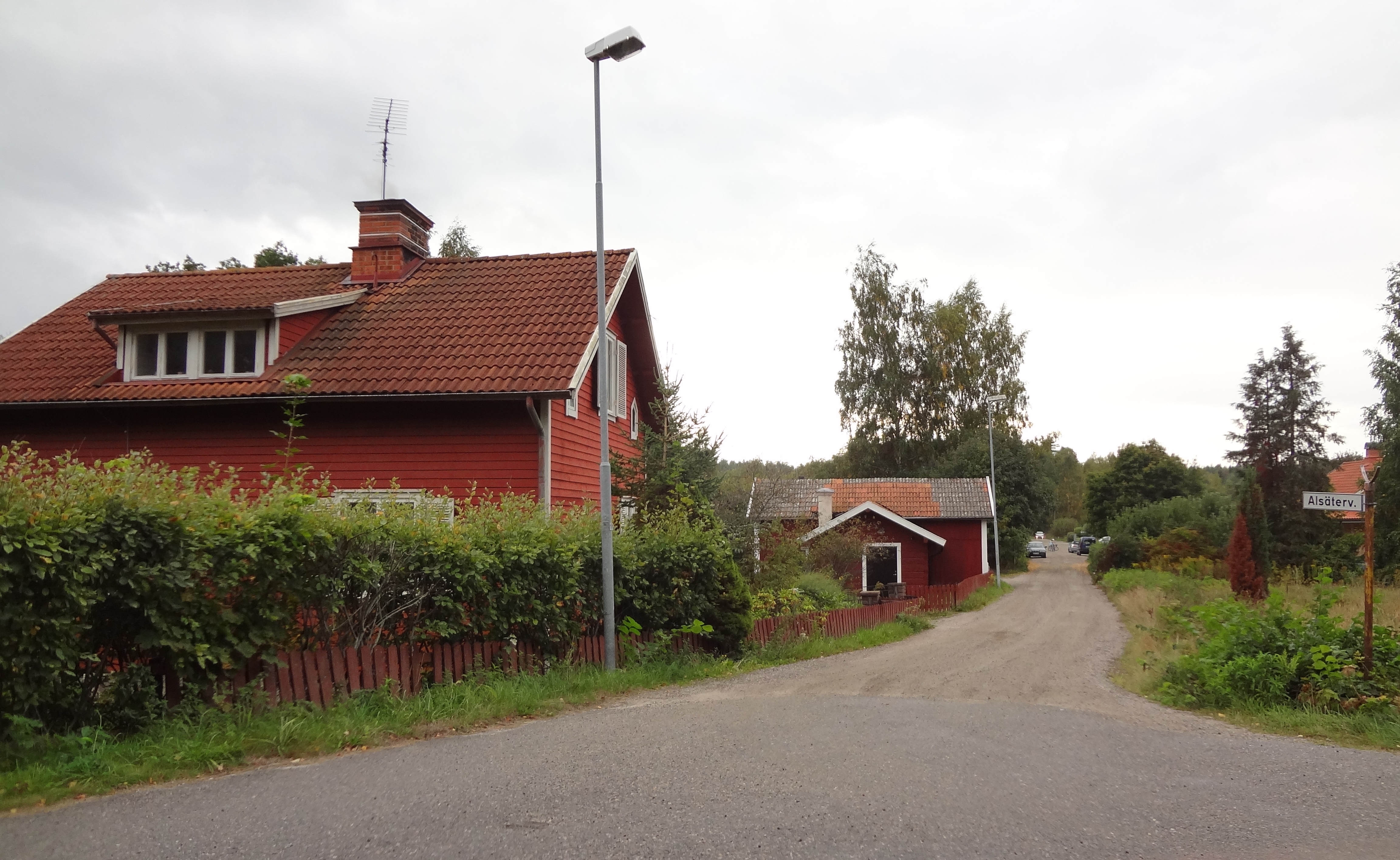 Alsätervägen i stadsdelen Flacksta i Eskilstuna.